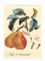 Poire-besy-de-chaumontel